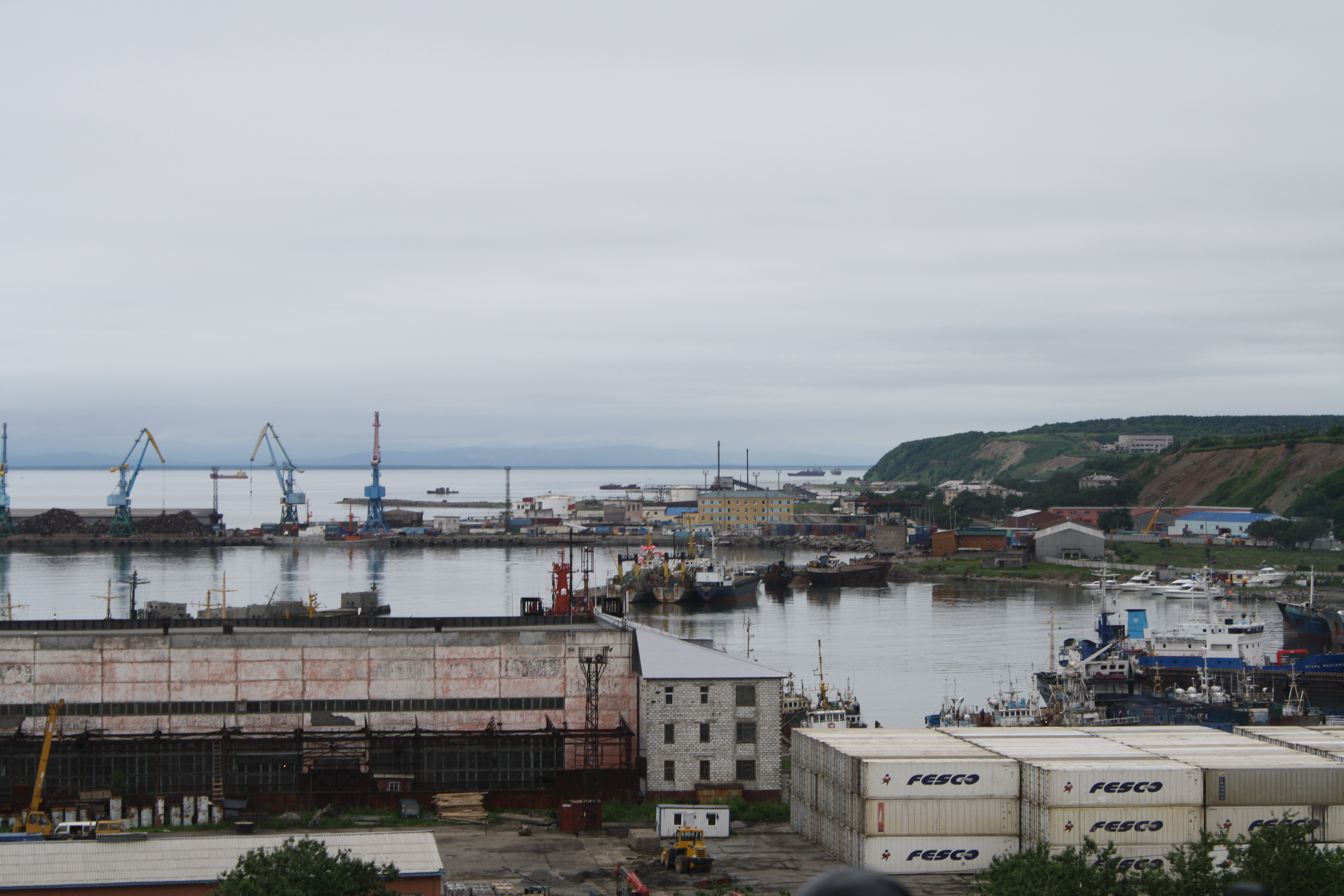 Aniva Bay. Korsakov. Russia. Залив Анива. Корсаков. Россия